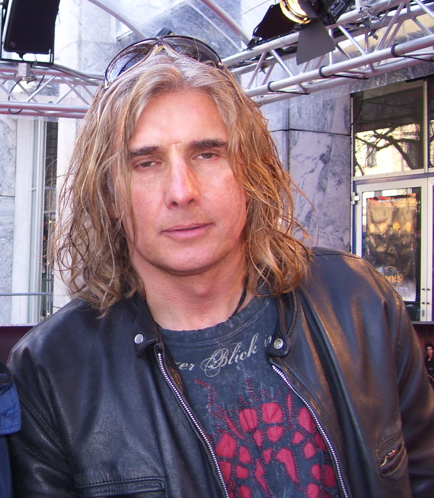 Joachim Massanek bei der Premiere von den Wilden Kerle 5